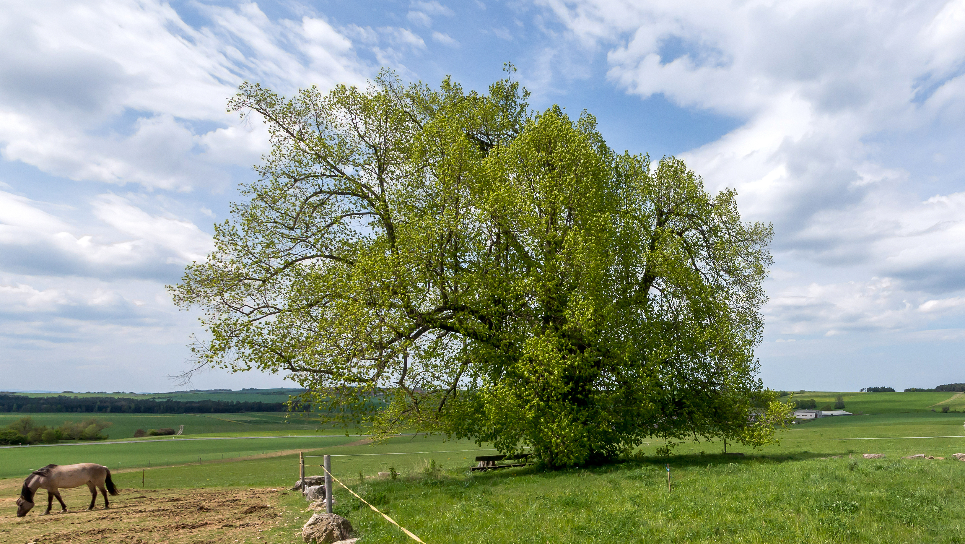 Knoll-Linde Listen Nr, 4 Haufeld IX